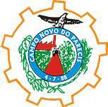 Brasão Campo Novo do Parecis